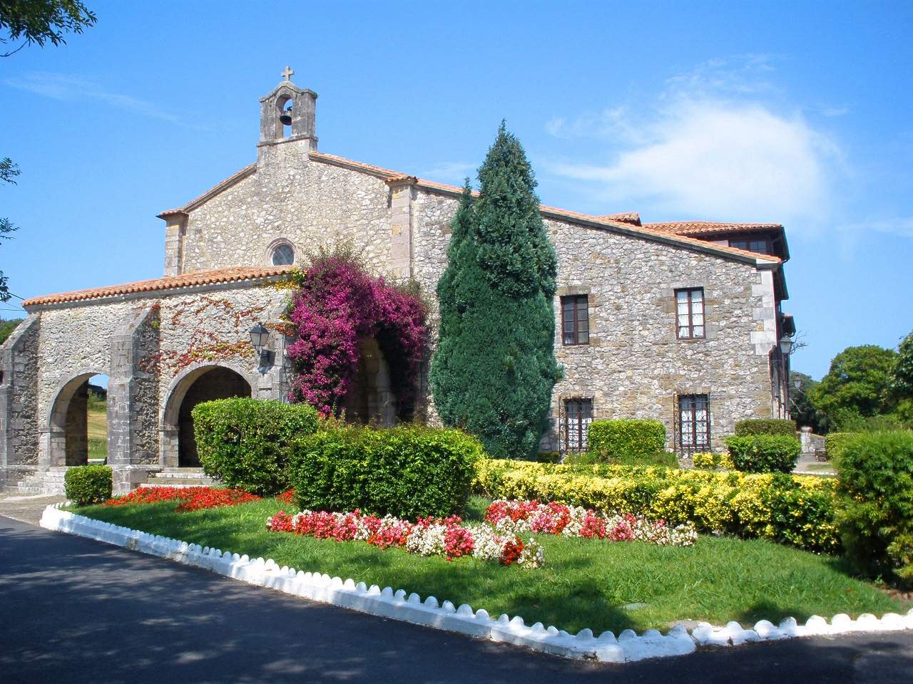 San Vicente de la Barquera (Cantabria) - Santuario de la Barquera